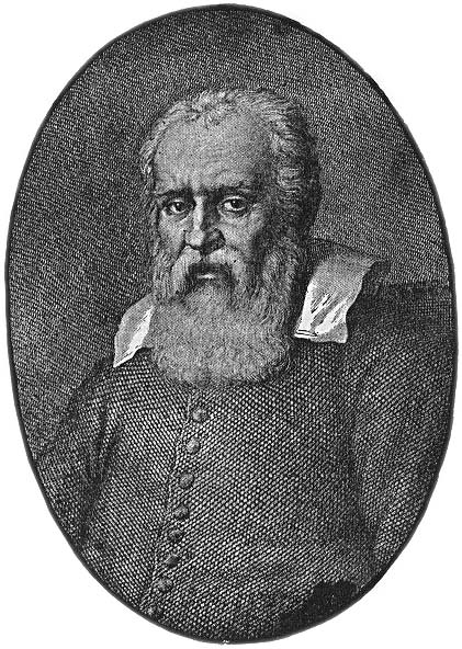 Galileo Galilei. Incisione tratta dal ritratto fattogli dal Passignano.